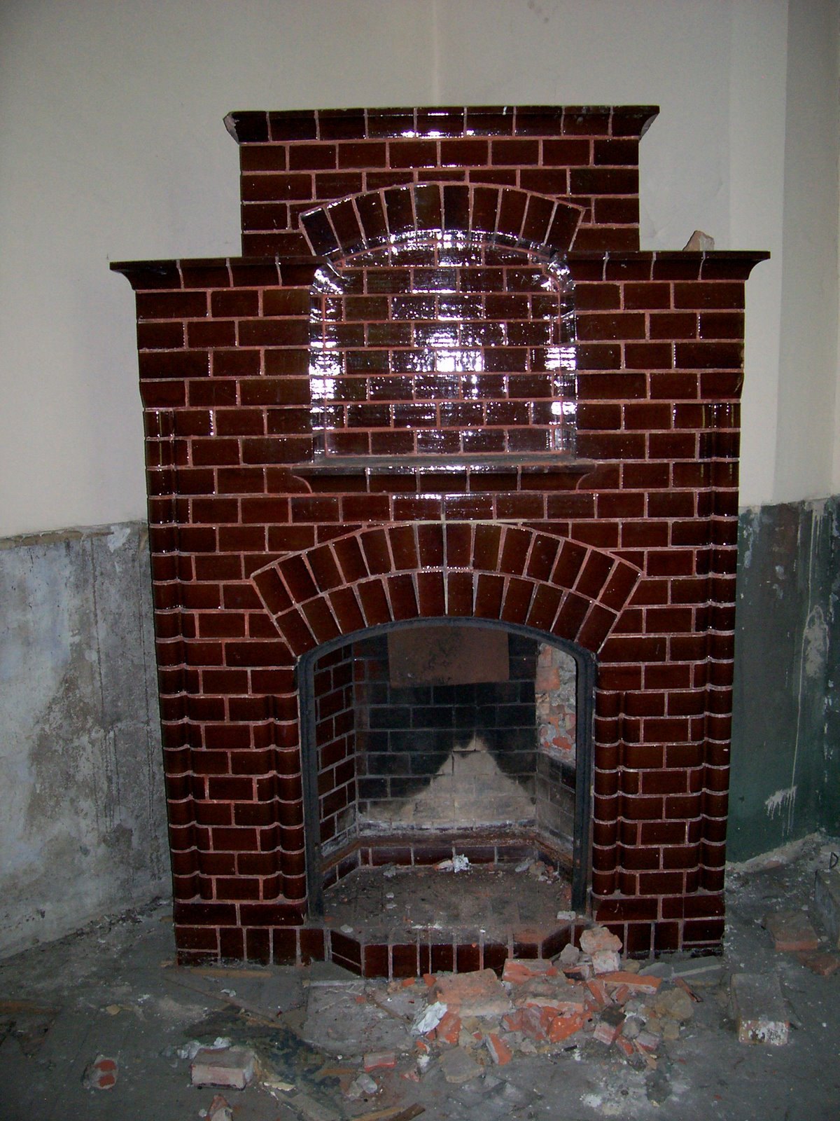 Rudnik: pałac z 1797 roku, kominek kaflowy